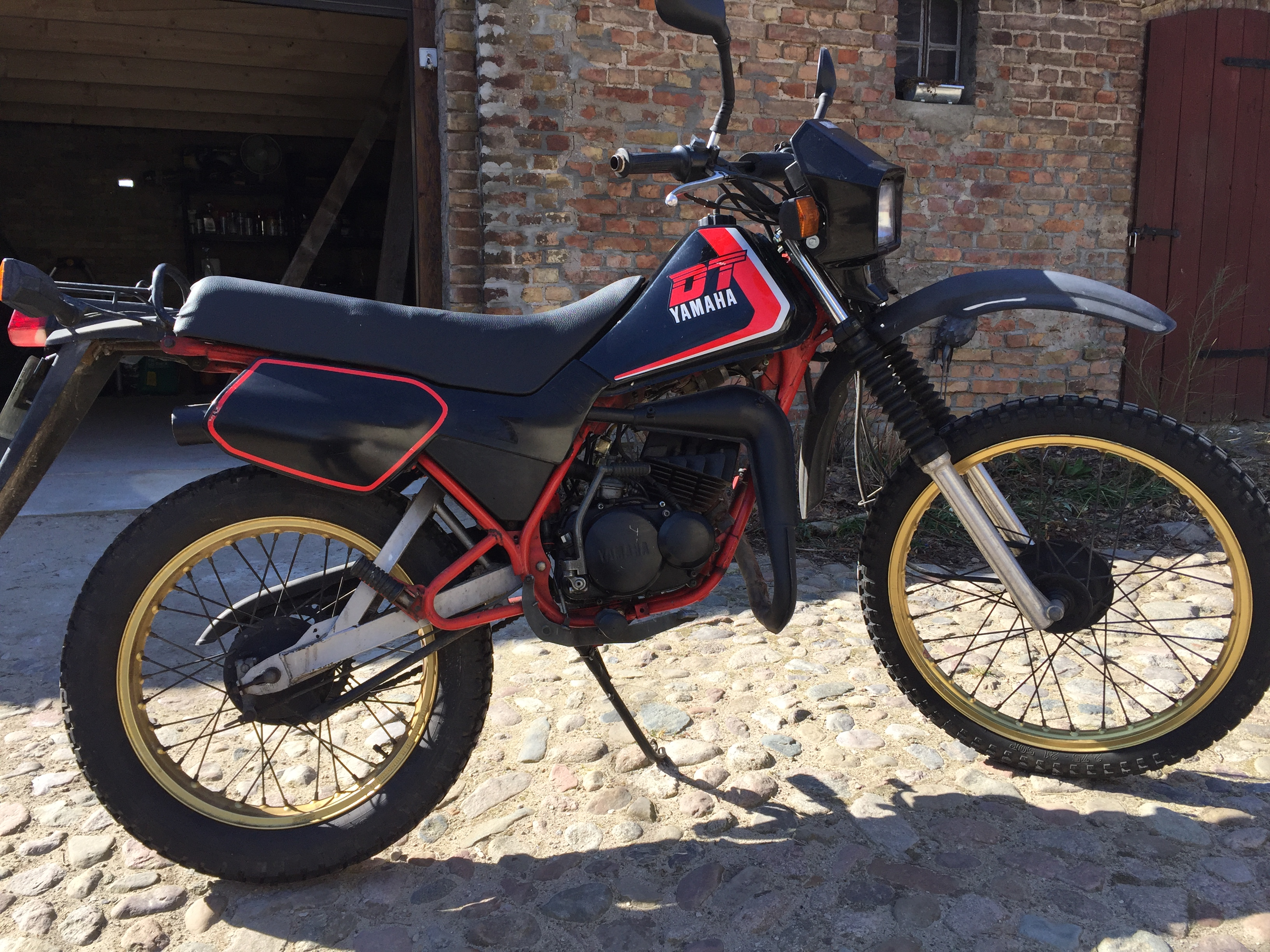 Yamaha DT 50 MX Original Aufnahme 2018